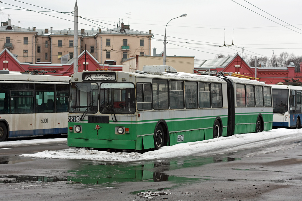 Троллейбус ЗиУ-6205 № 6603 на территории 5-го троллейбусного парка в Москве.